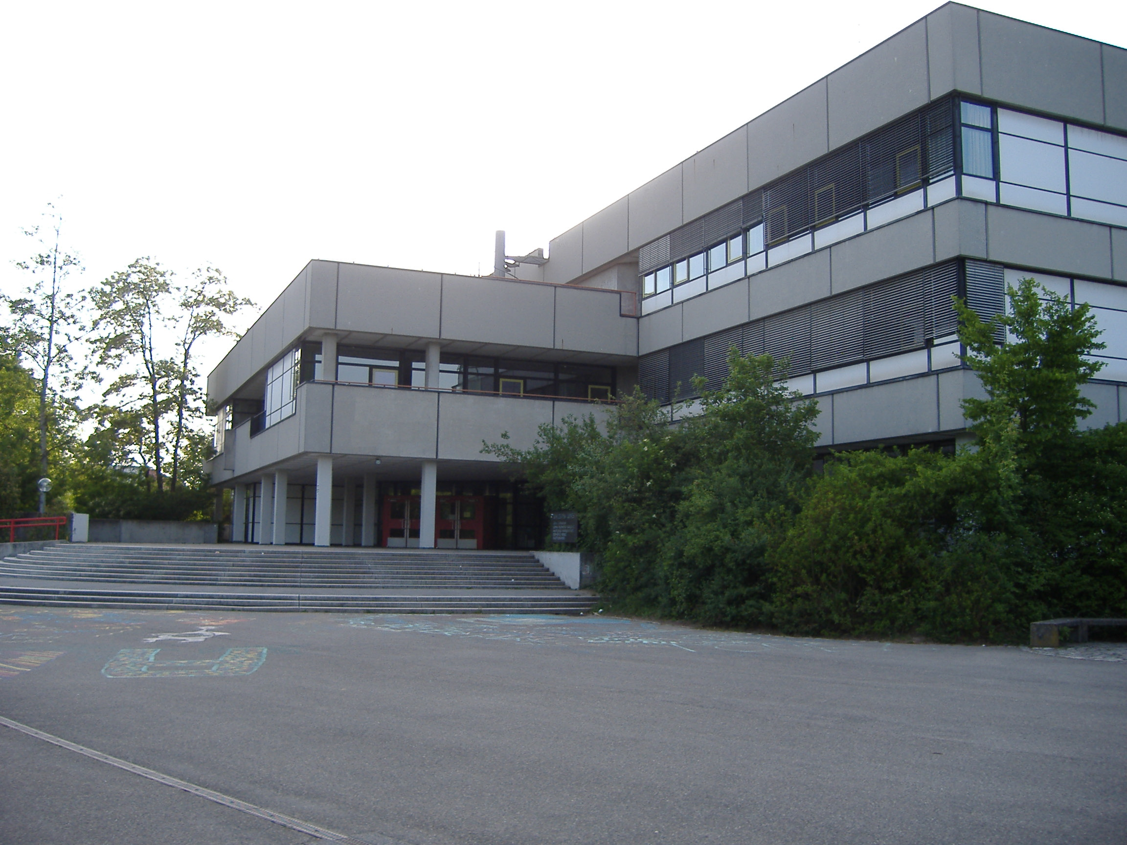 Der Haupteingang des Apian Gymnasiums Ingolstadt.